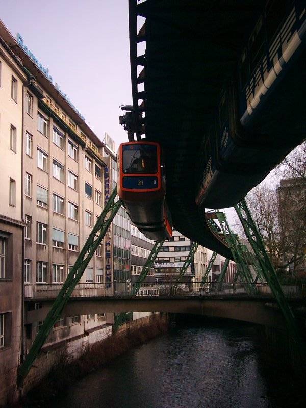 Wupperbrücke Hofaue